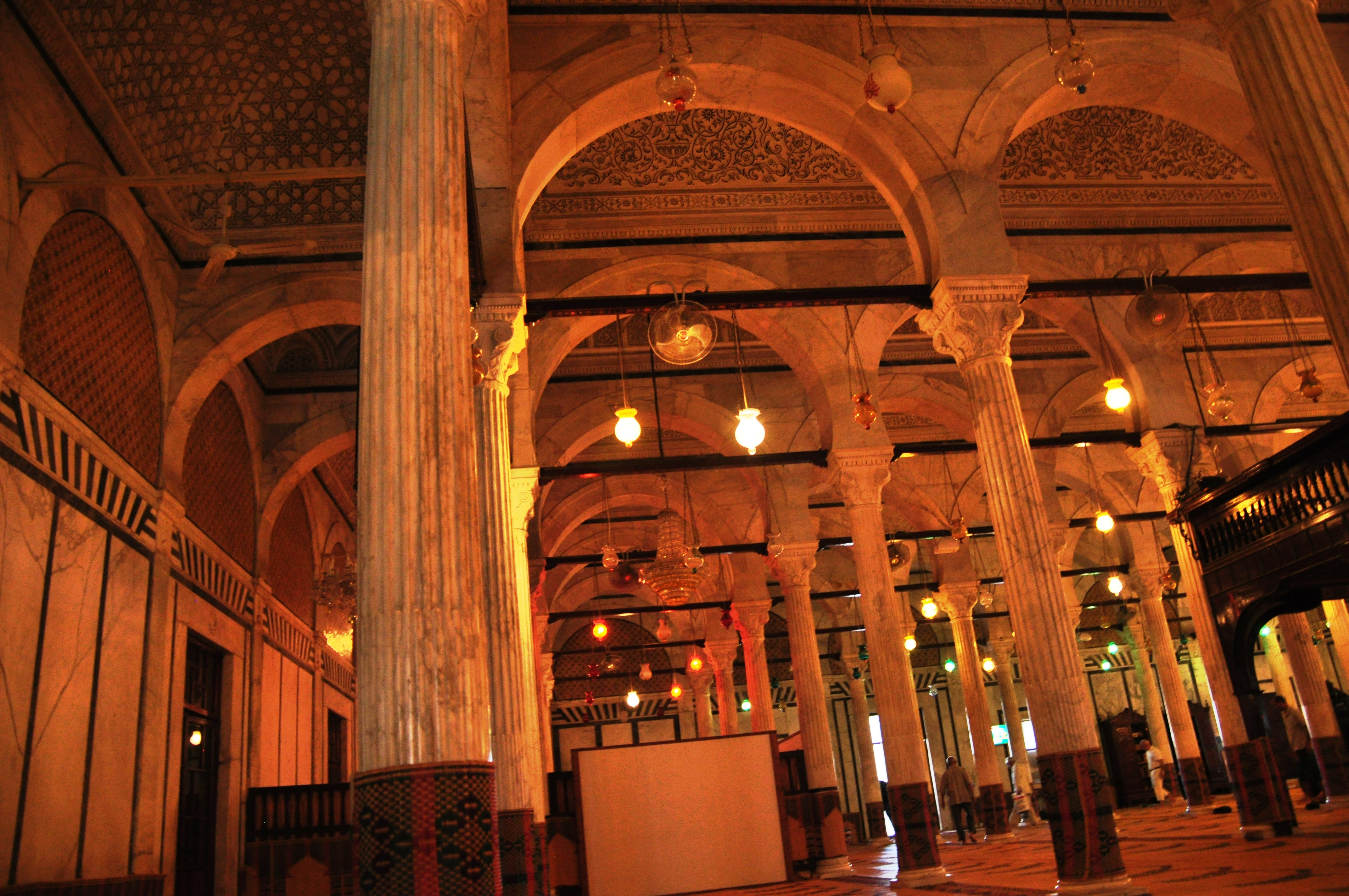 Mosquée Saheb Tabâa